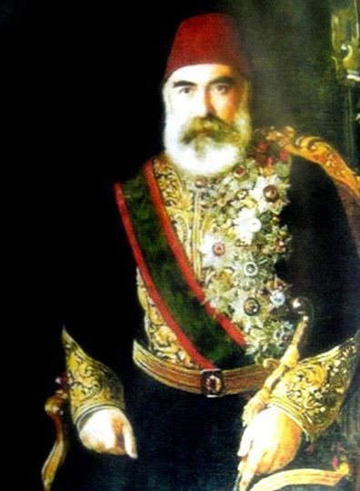 Портрет министра финансов Османской империи Акопа Казазяна (1833—1891) кисти неизвестного.